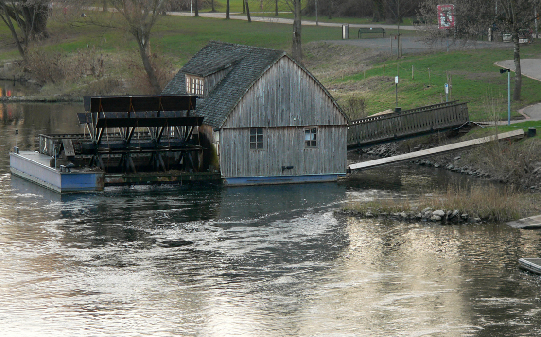 Schiffsmühle Minden